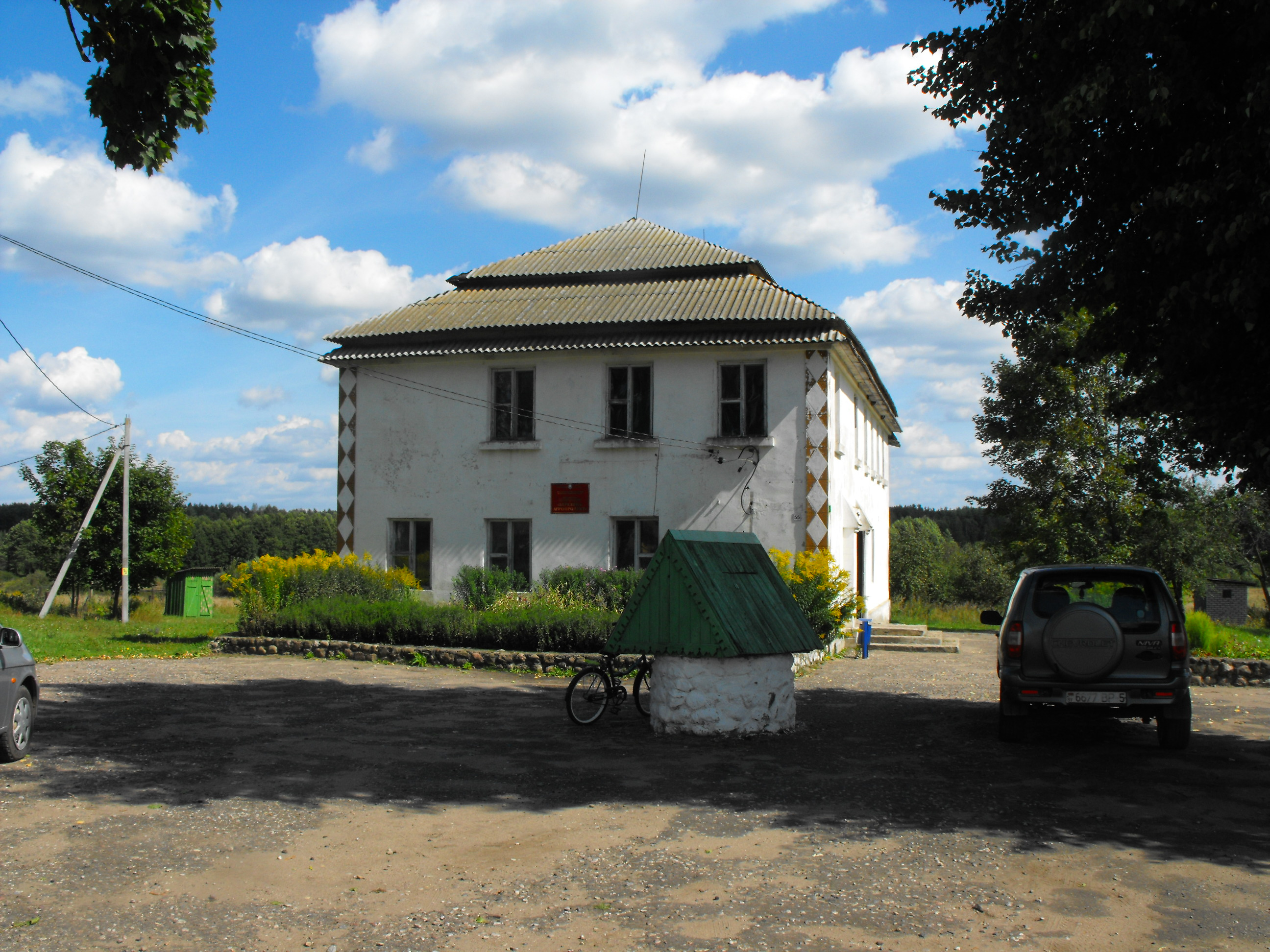 Здание бывшей синагоги XIX века (построена в 1875 году) в деревне Городок Молодечненского района на улице Молодечненской, 55. Сейчас - контора различных учреждений.